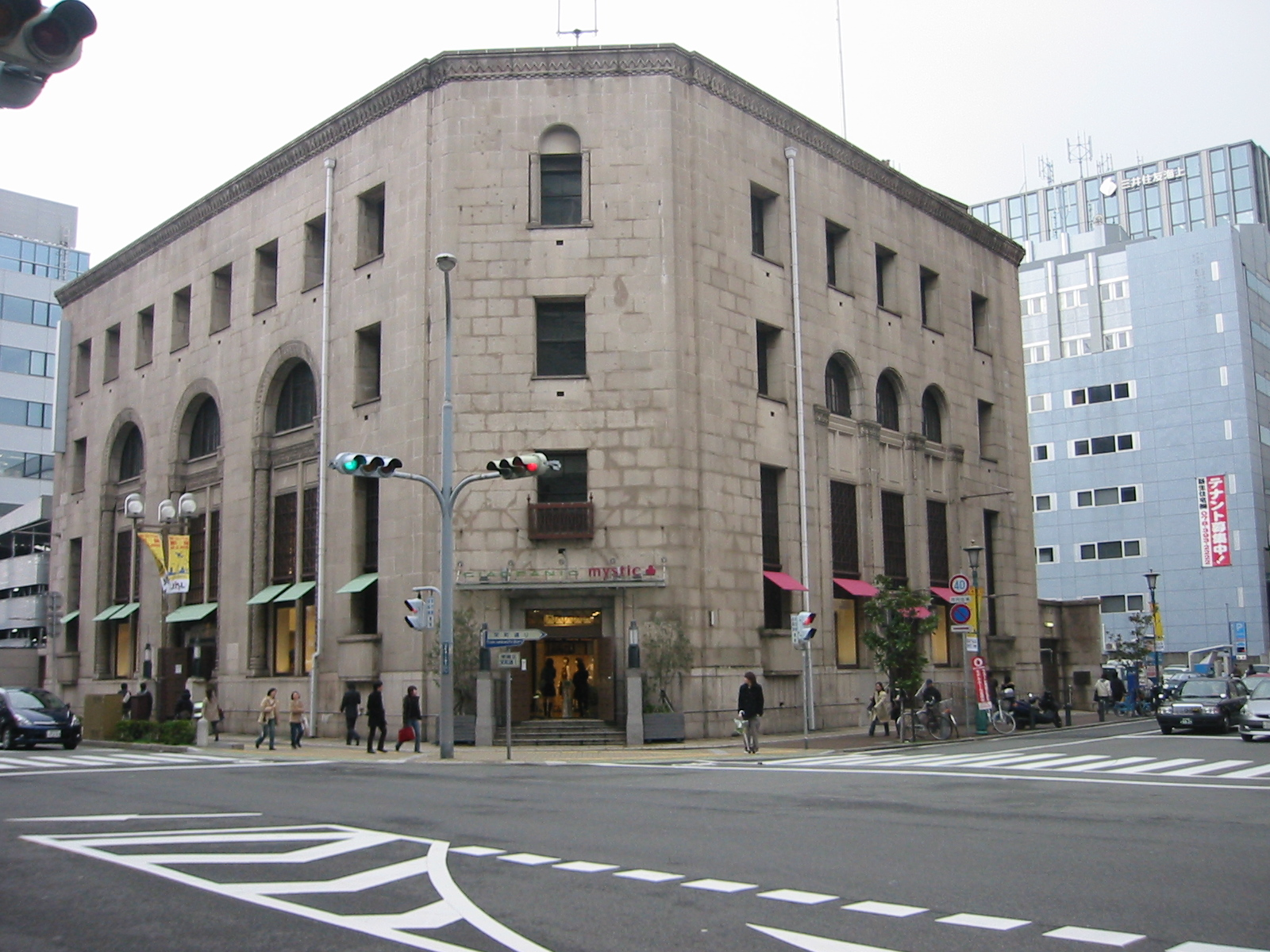 旧・神戸住友ビル / 現mystic店舗 銀泉神戸ビル-1934年